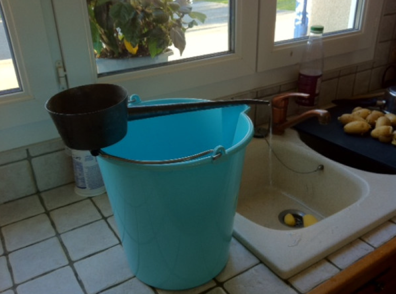 Cassotte : ustensile d'hygiène utilisé notamment en Charentes.